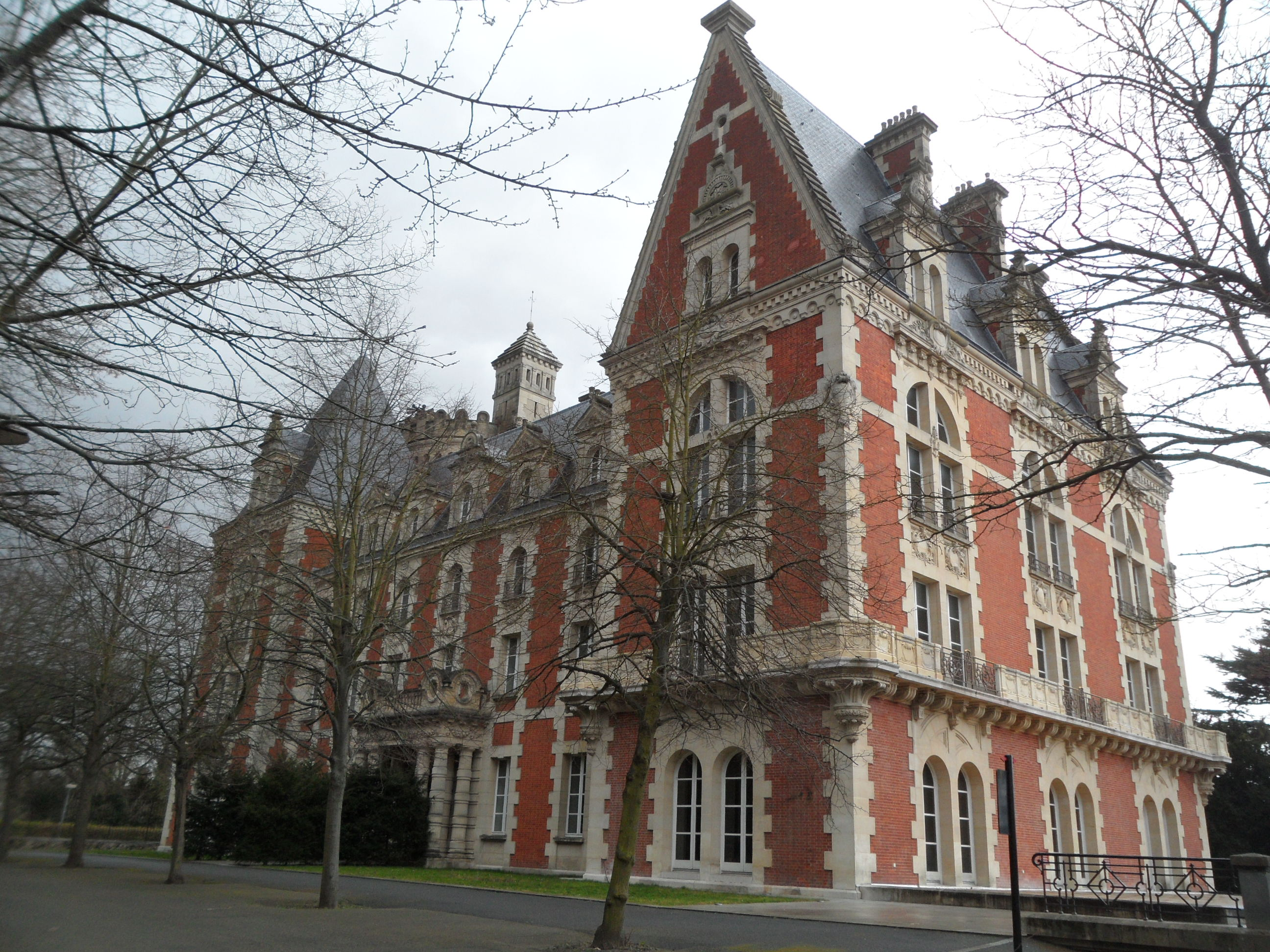 Le Château d'Hennemont date du début du XXe siècle